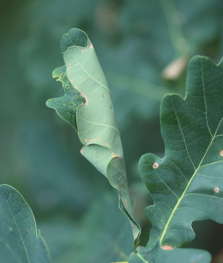 Eichenblattwickel mit einer Raupe von Ancylis mitterbacheriana darin; am 28. Juli 2020 in der Schwetziinger Hardt